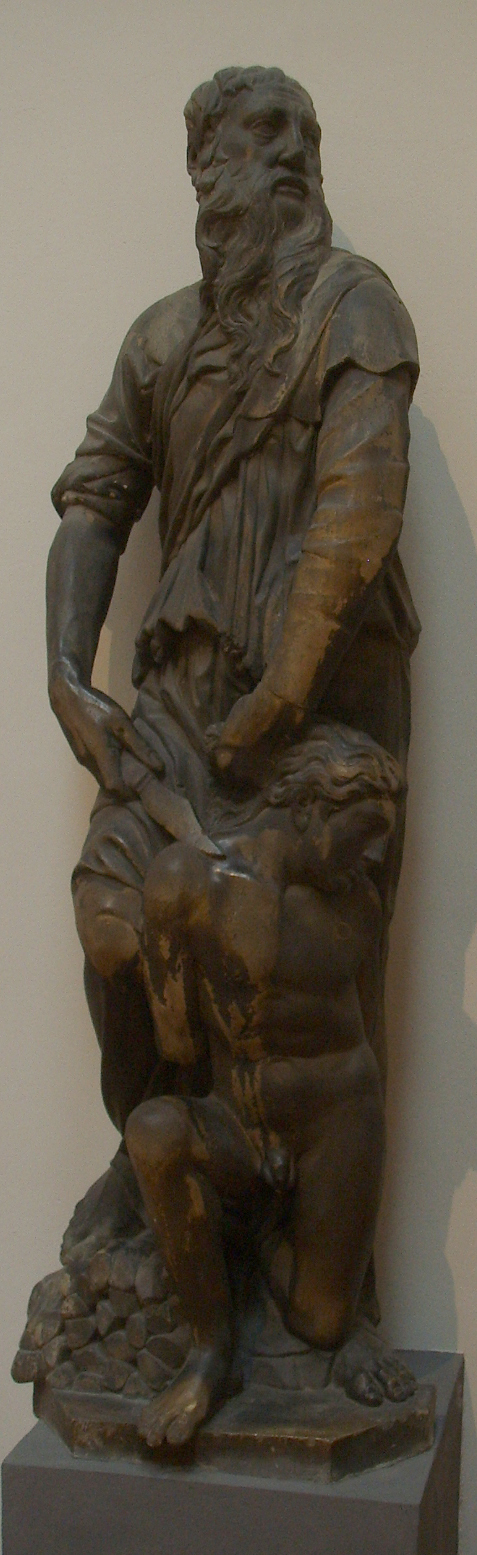 Opera del duomo (FI), donatello e nanni di bartolo, abramo e isacco 1421